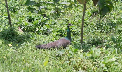 മയില്‍